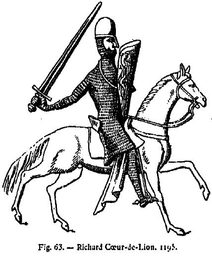 Gravure représentant le sceau de Richard Coeur de lion en 1195